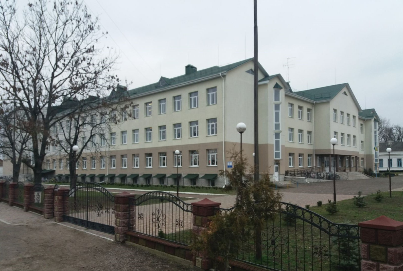 Станом на початок 2020 року тут навчається 900 учнів